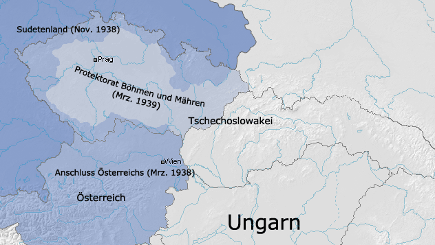 Die Ausdehnung des Deutschen Reiches im Jahr 1939